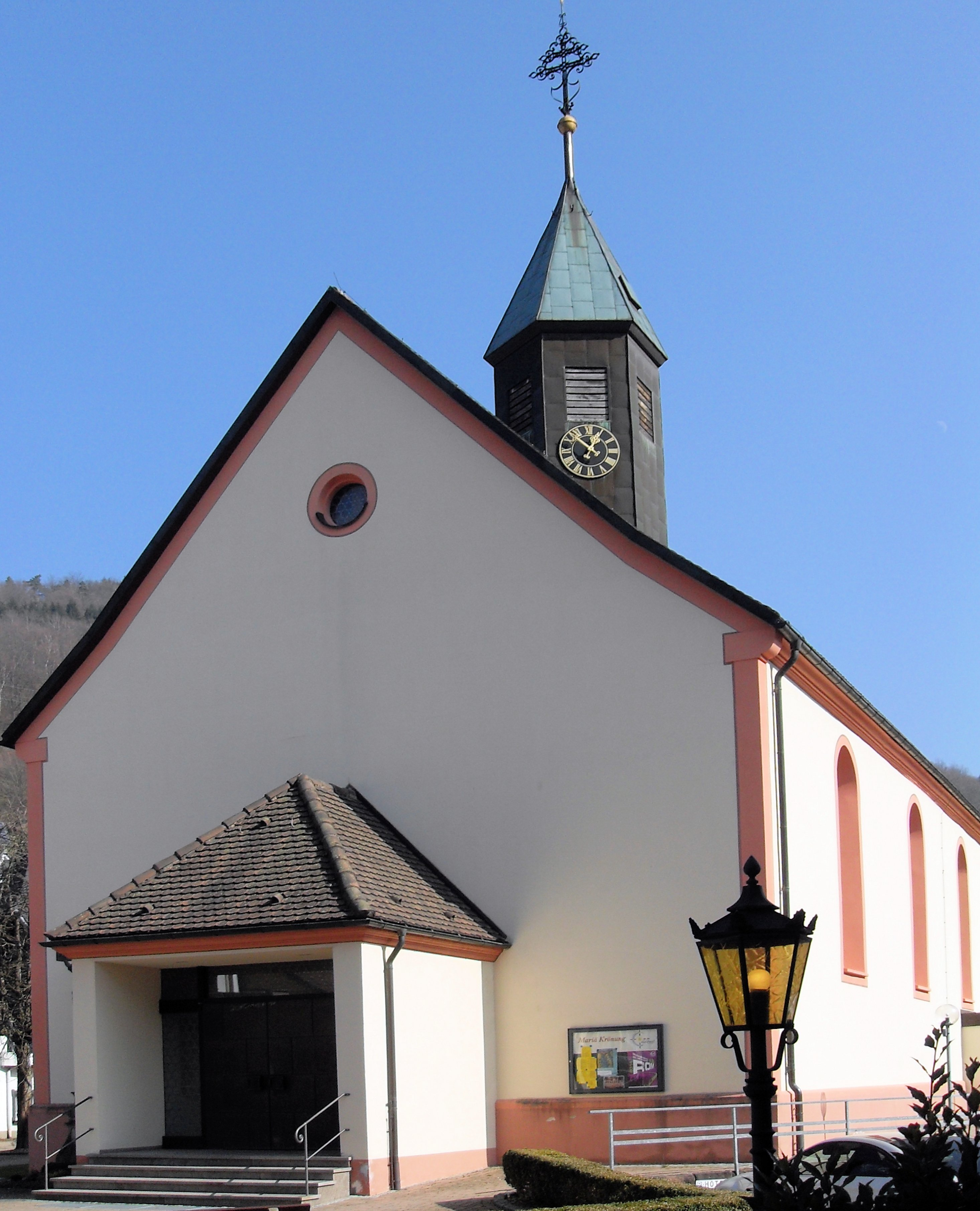 Kirche Mariä Kronung in Oberprechtal, StadtElzach, Landkreis Emmendingen